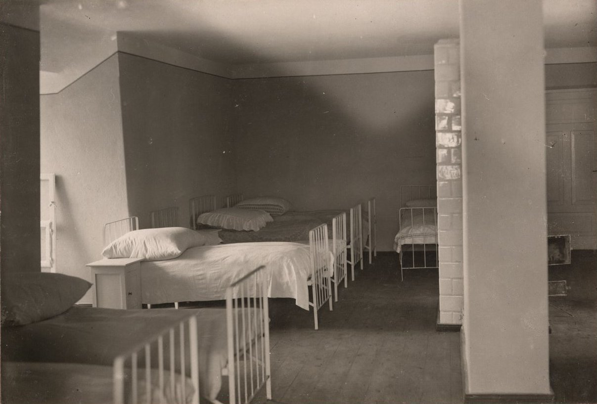 Wnętrza mieszkalne Niższej Żeńskiej Szkoły Rolniczej Sejmiku Suwalskiego w Kukowie.